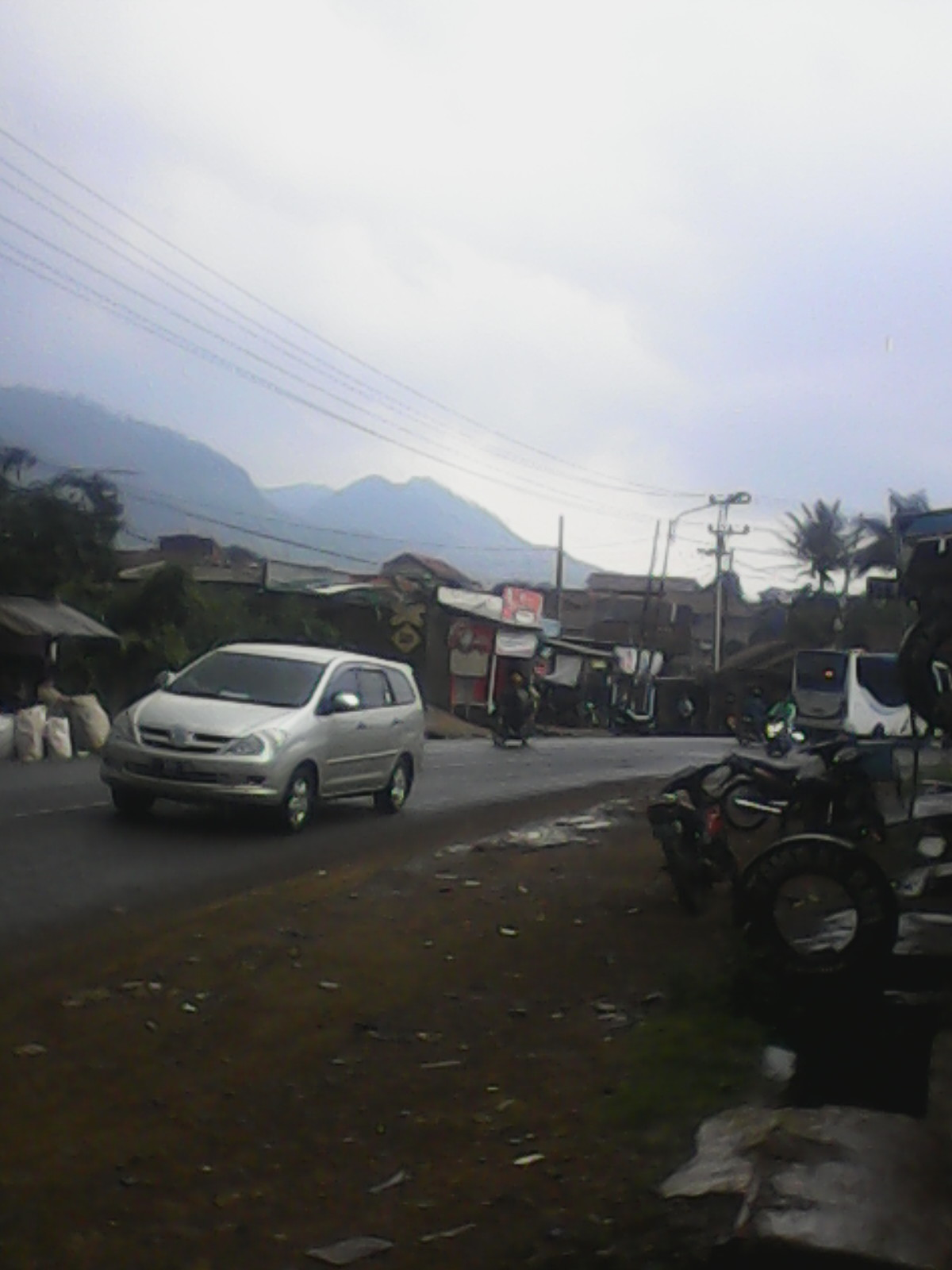 Pemandangan di kecamatan Cicalengka